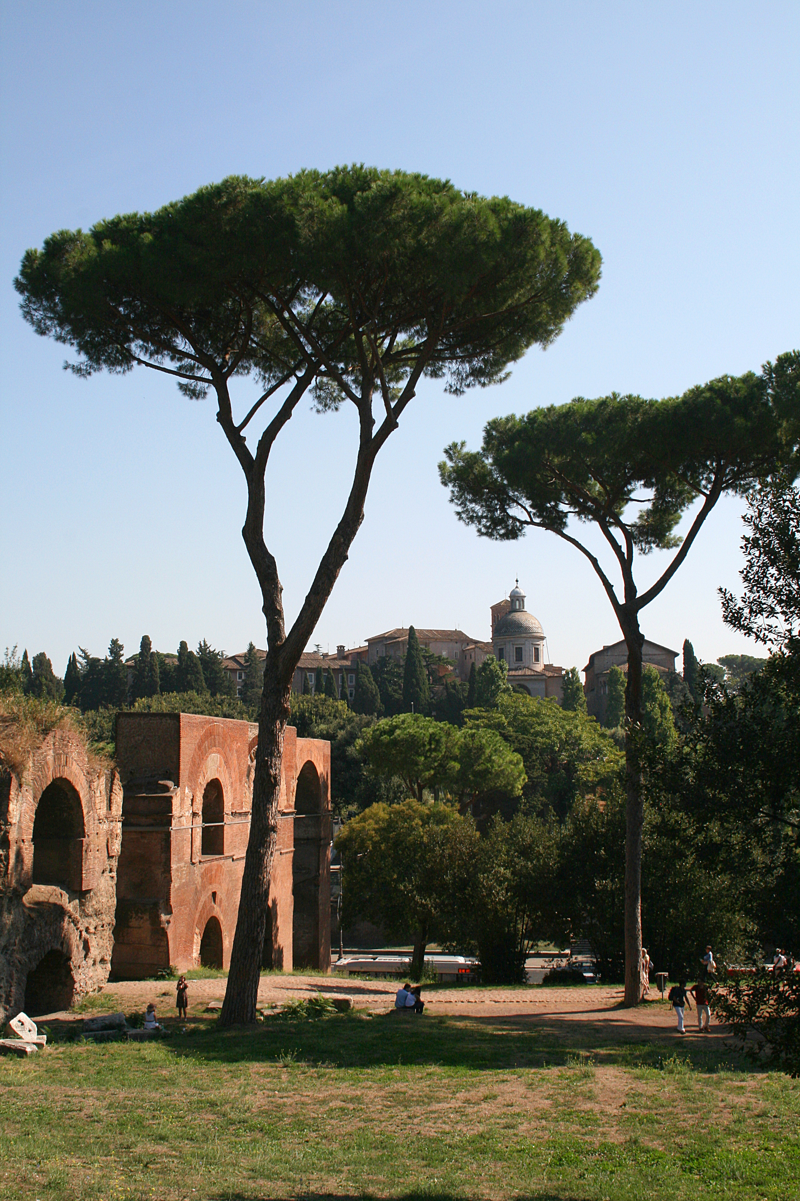 Arches de la section de l'Aqua Claudia dit Aqueduc de Néron et tour de la Basilique San Giovani e Paolo vues depuis le parc du Mont Palatin à (Rome).